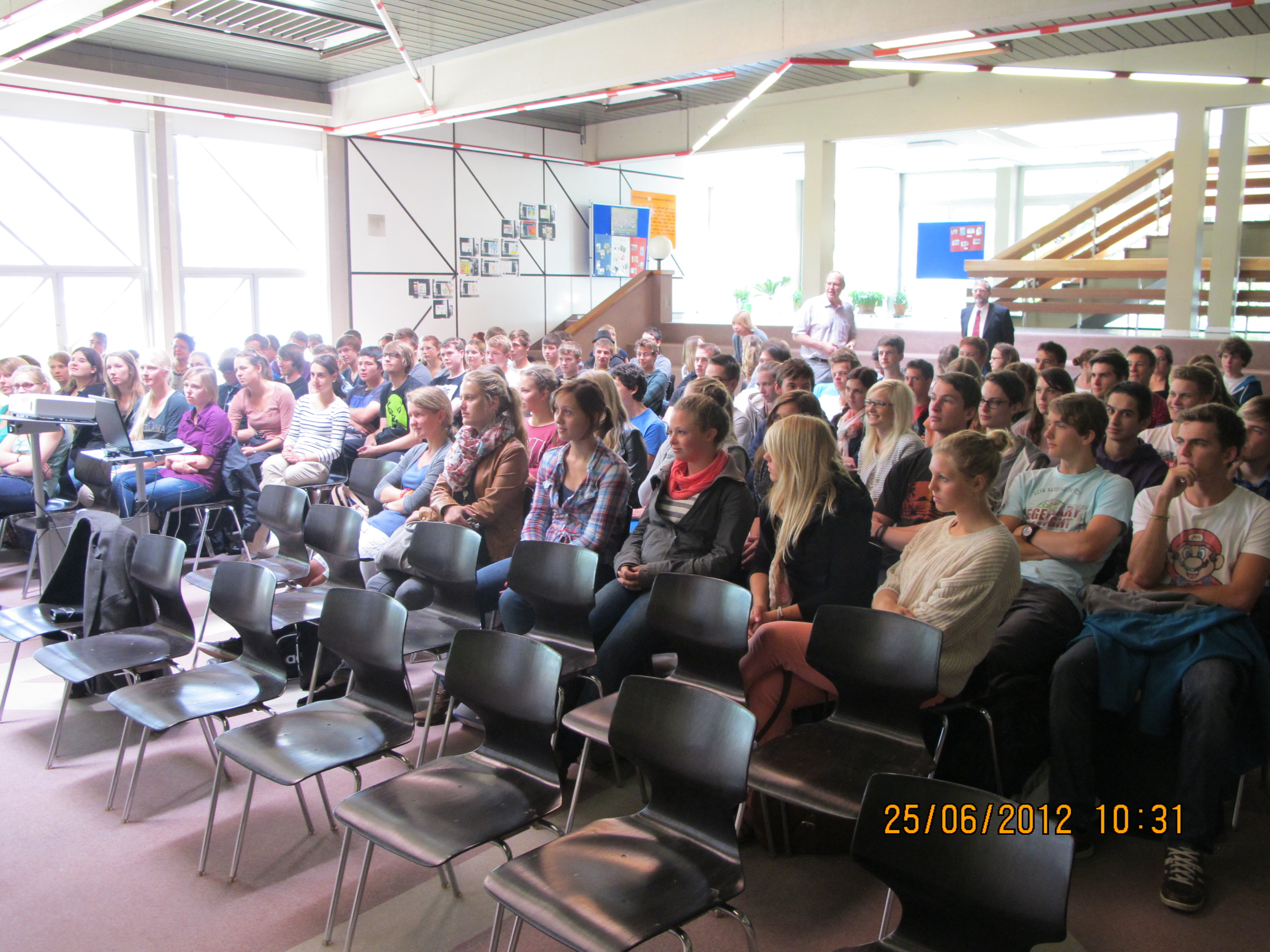 Prof. Skotnicki im Gymnasium Wertingen